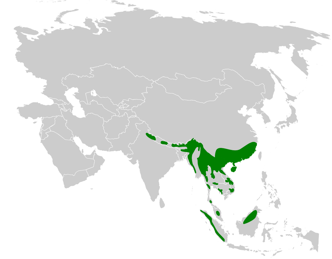 Hemixos distribution map